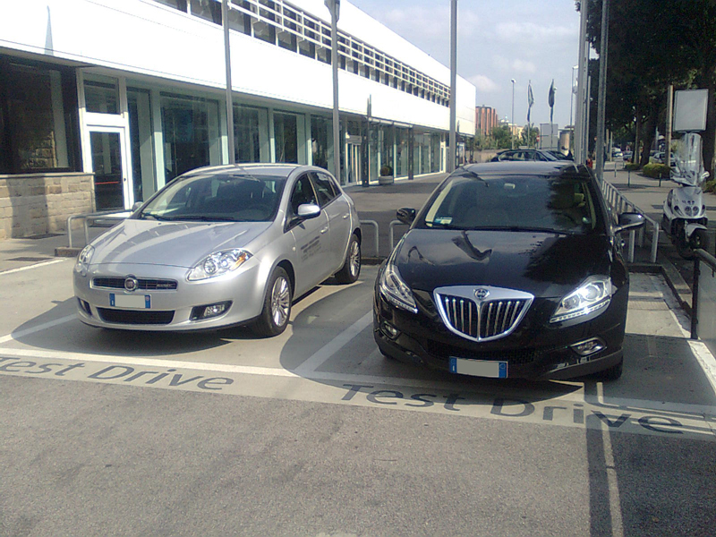 Una Lancia Delta e una Fiat Bravo, utilizzate per i test drive